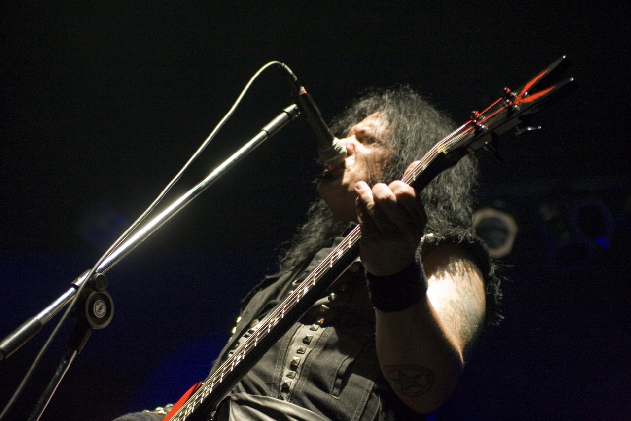 David Vincent of Morbid Angel Live @ Santana Hall - 08/03/2009 - São Paulo, Brasil É proibida a cópia ou reprodução deste material sem a autorização do autor. Por favor, não publique nada daqui sem o devido crédito. Fotógrafo: Alexandre Cardoso